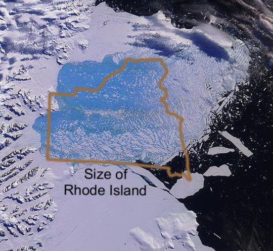 Photo glacier Larsen B et comparaison avec Rhode Island, USA